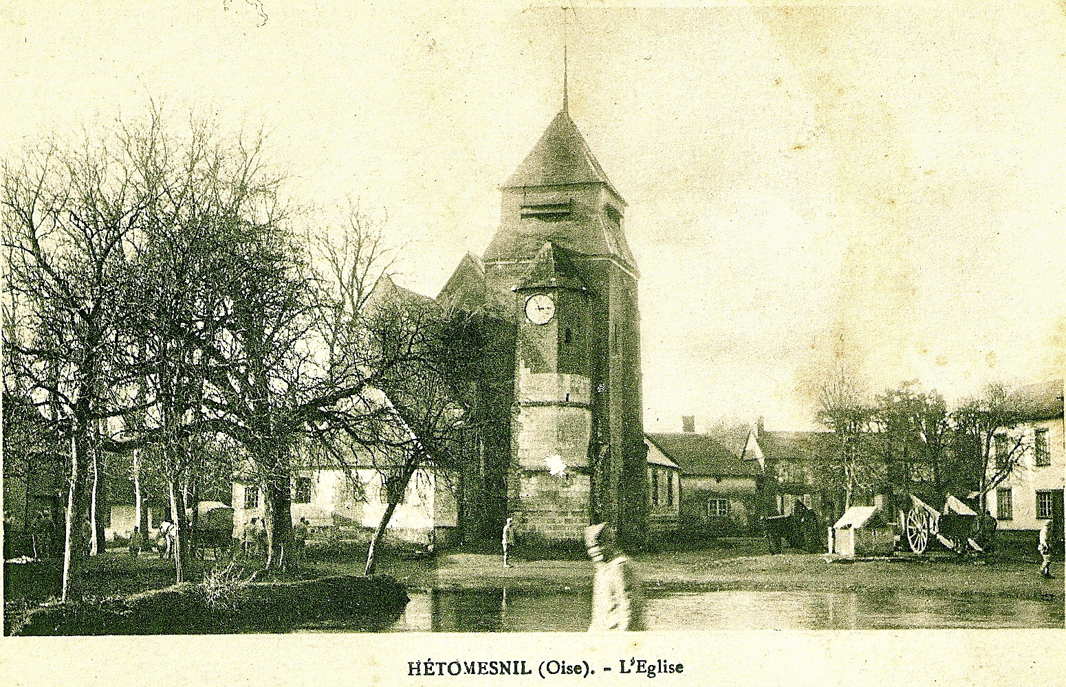 Carte postale ancienne Hétomesnil : L'église